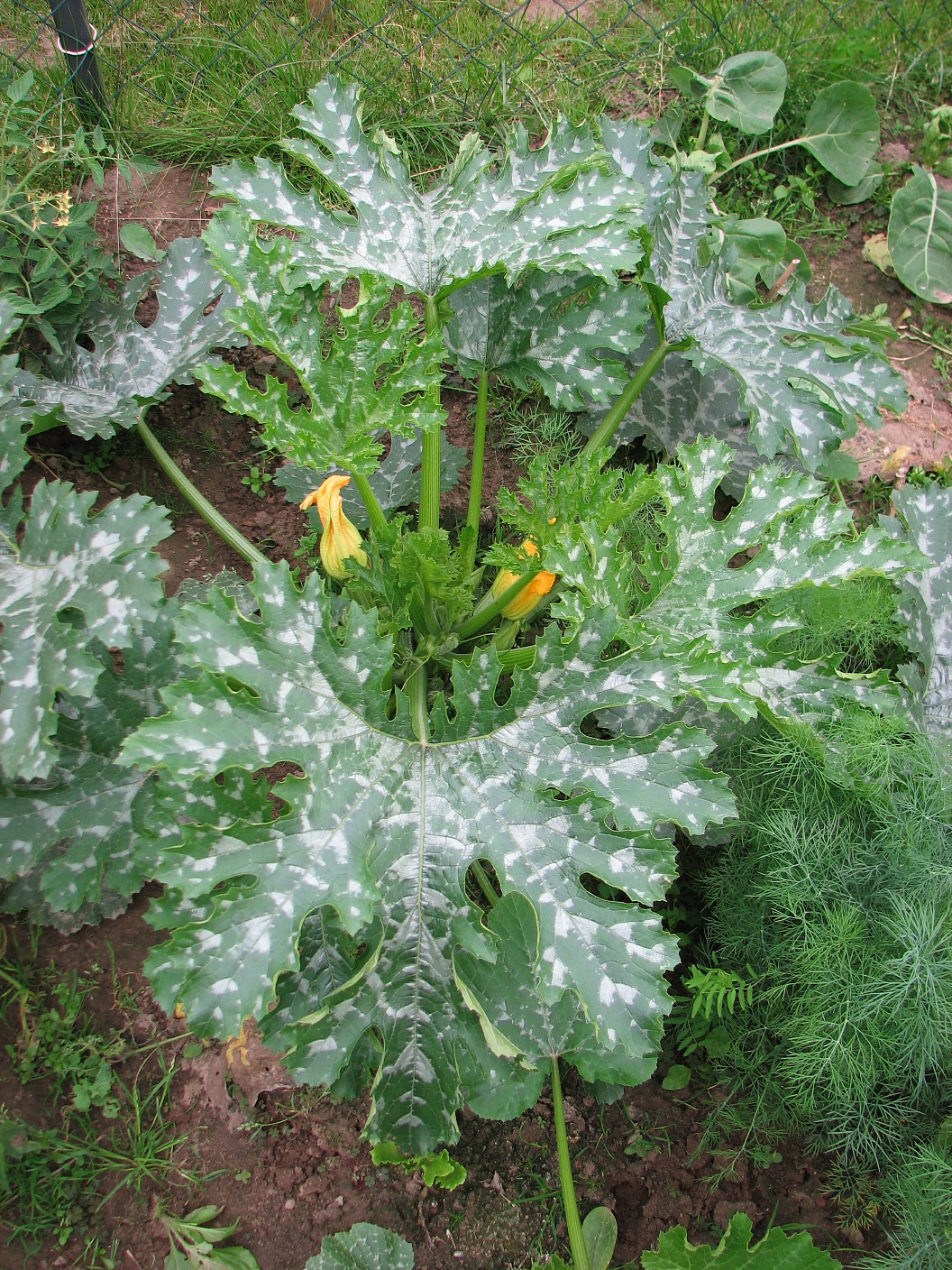 cukinia